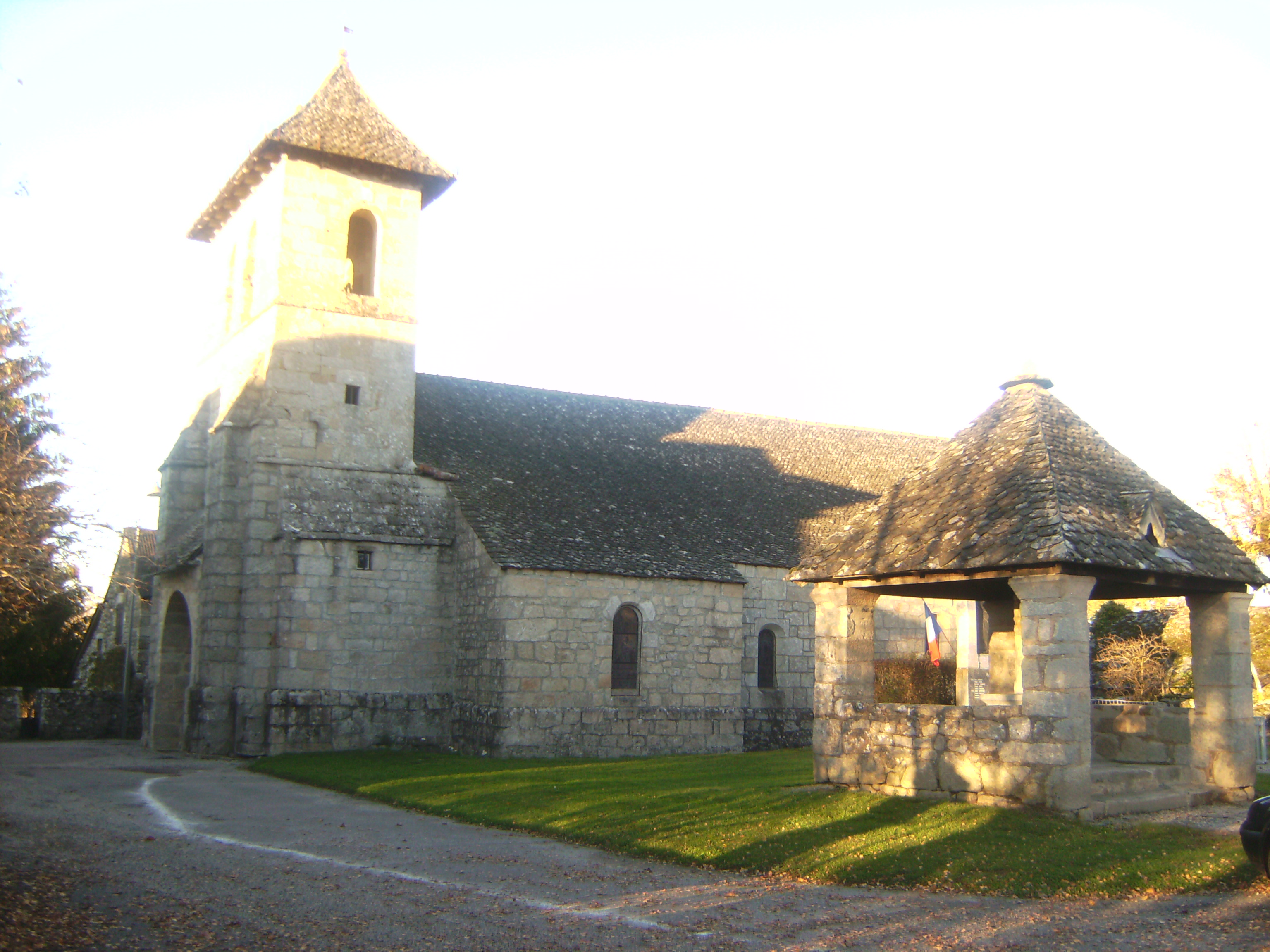 Eglise de Bassignac-le-Haut, et croix monumentale